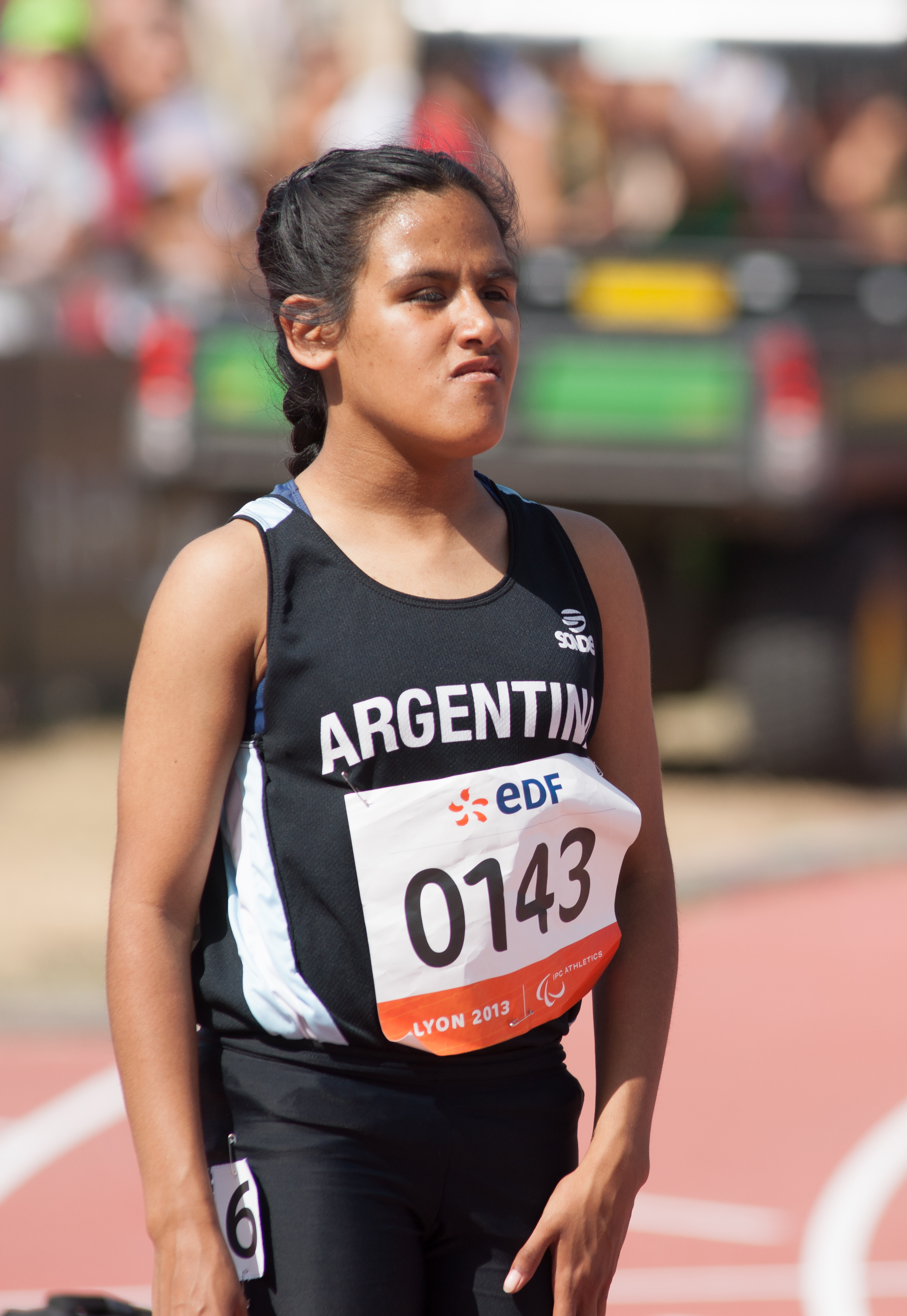 Championnats du monde d'athlétisme IPC 2013. 100 mètres féminin T36.